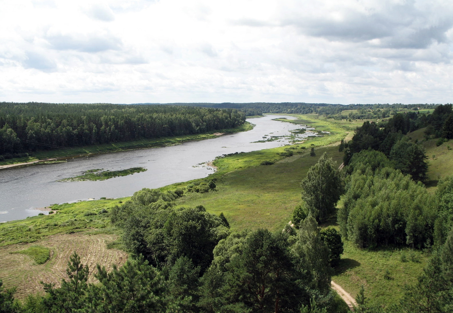 Latvia,Daugavas loki